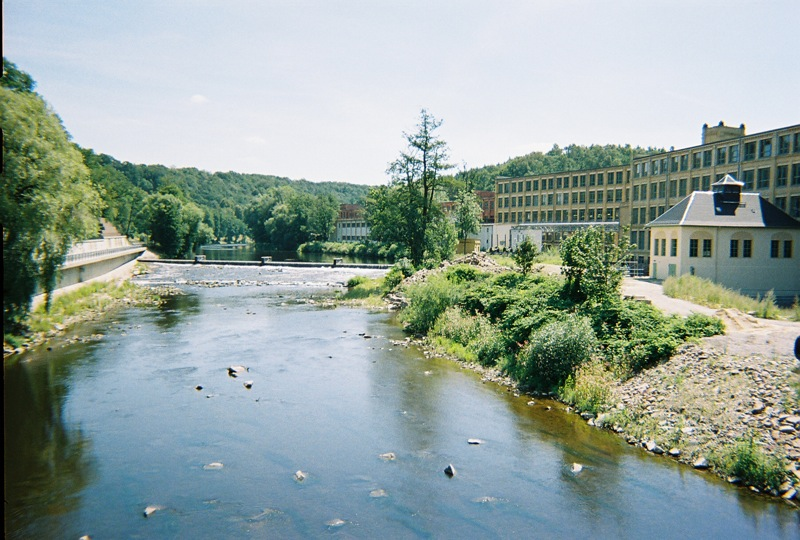 Zschopau River from Mittweida